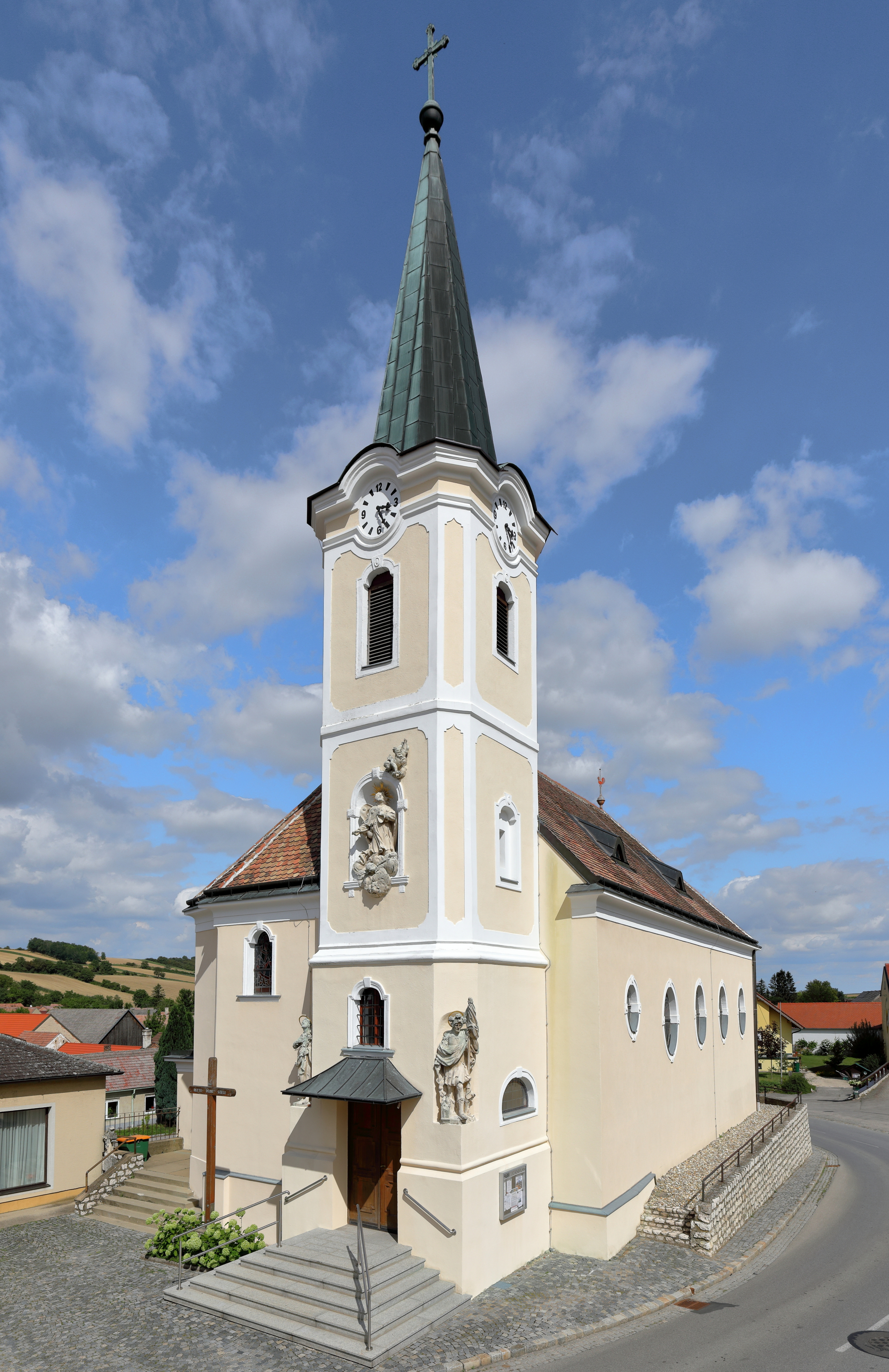 Westsüdwestansicht der röm.-kath. Pfarrkirche hl. Koloman im Ortszentrum von Eichenbrunn, ein Ortsteil der niederösterreichischen Gemeinde Gnadendorf.Ursprünglich eine barocke Kirche mit westlichem Fassadenturm um 1700 und nördlichem Seitenschiff aus dem Jahr 1731. 1950 wurde die Kirche nach Plänen des Architekten Josef Vytiska umgebaut und erweitert.